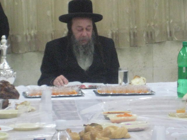 ADMOR ZWIL